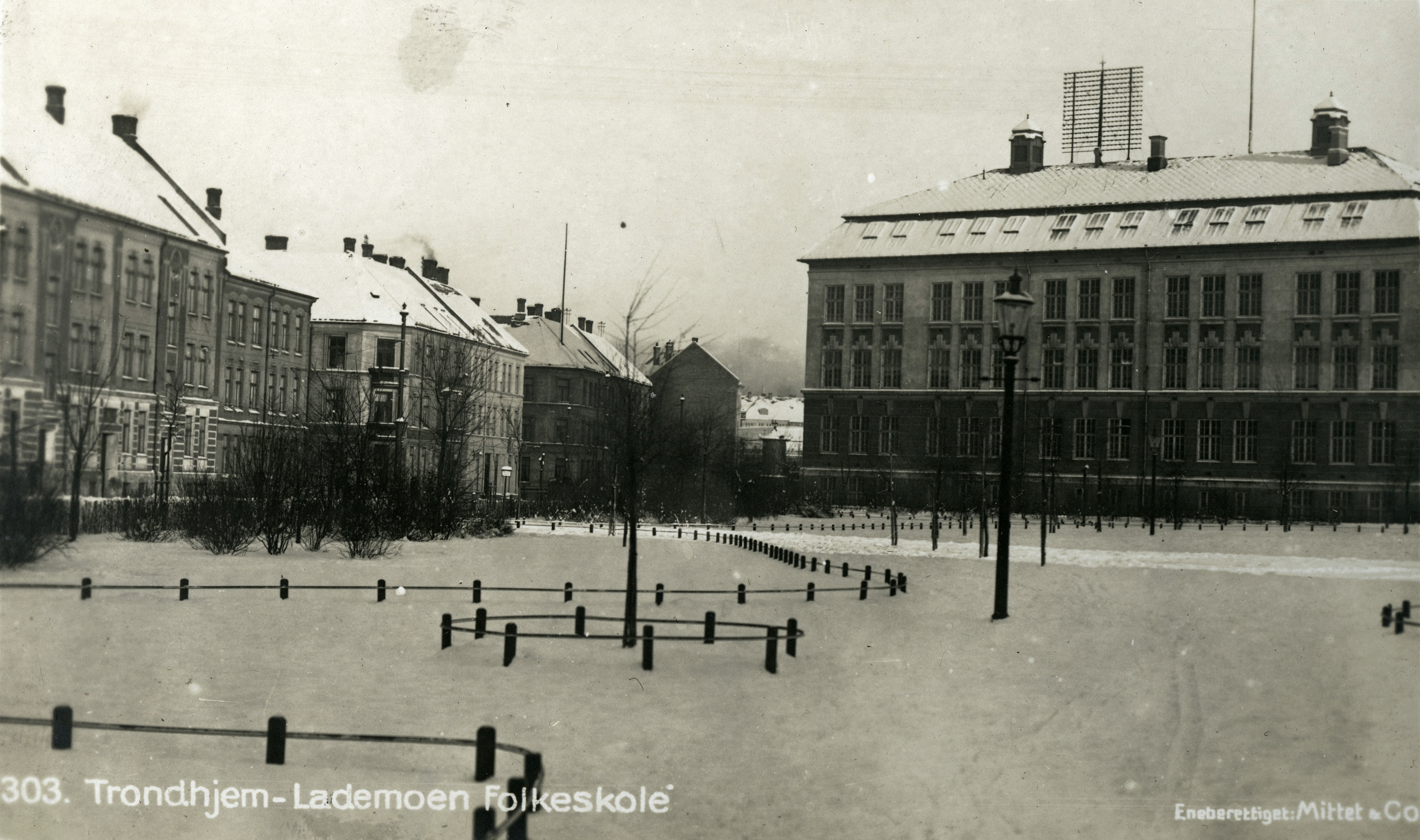 Format: Postkort. År: Tidlig 1900-tall, ca. 1910 - 1915. Foto: Mittet & Co.